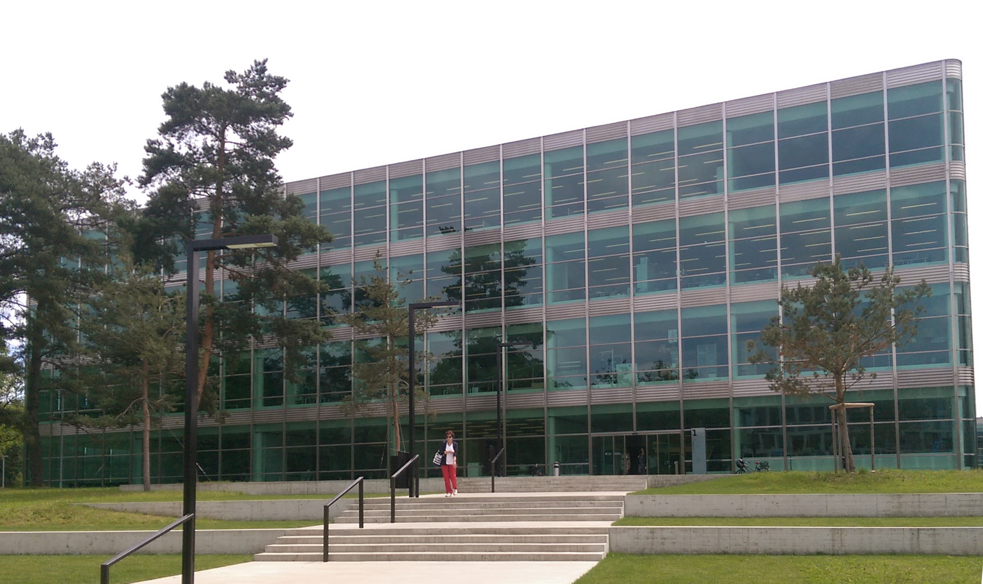 Gebäude der HTL Windisch